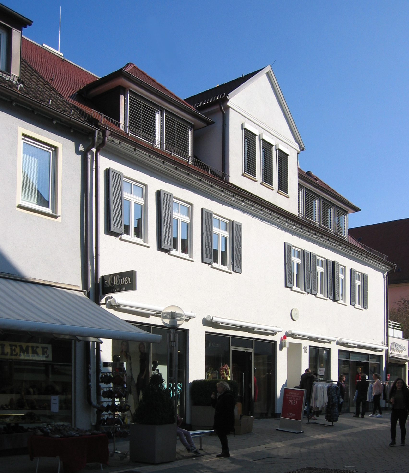 Kirchstraße 18, Ludwigsburg